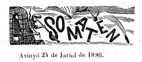 Capçalera d'una secció de Lo Torronyau